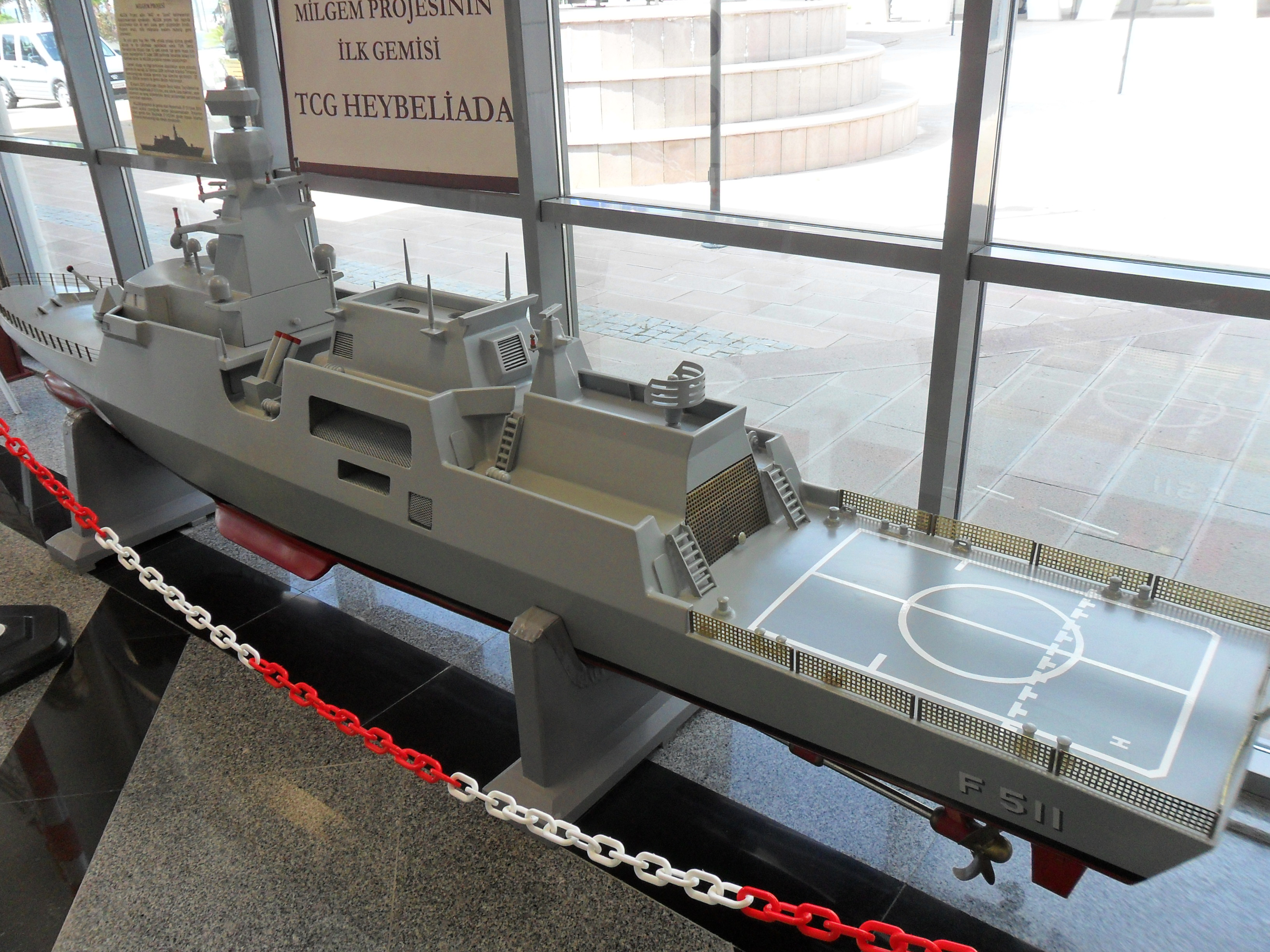 Mersin Deniz Müzesinde sergilenmekte olan TCG Heybeliada maketi.